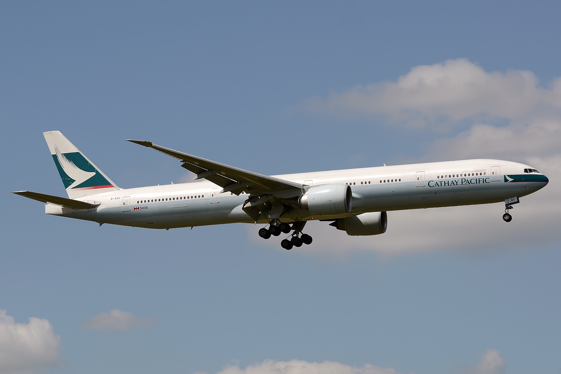 LHR